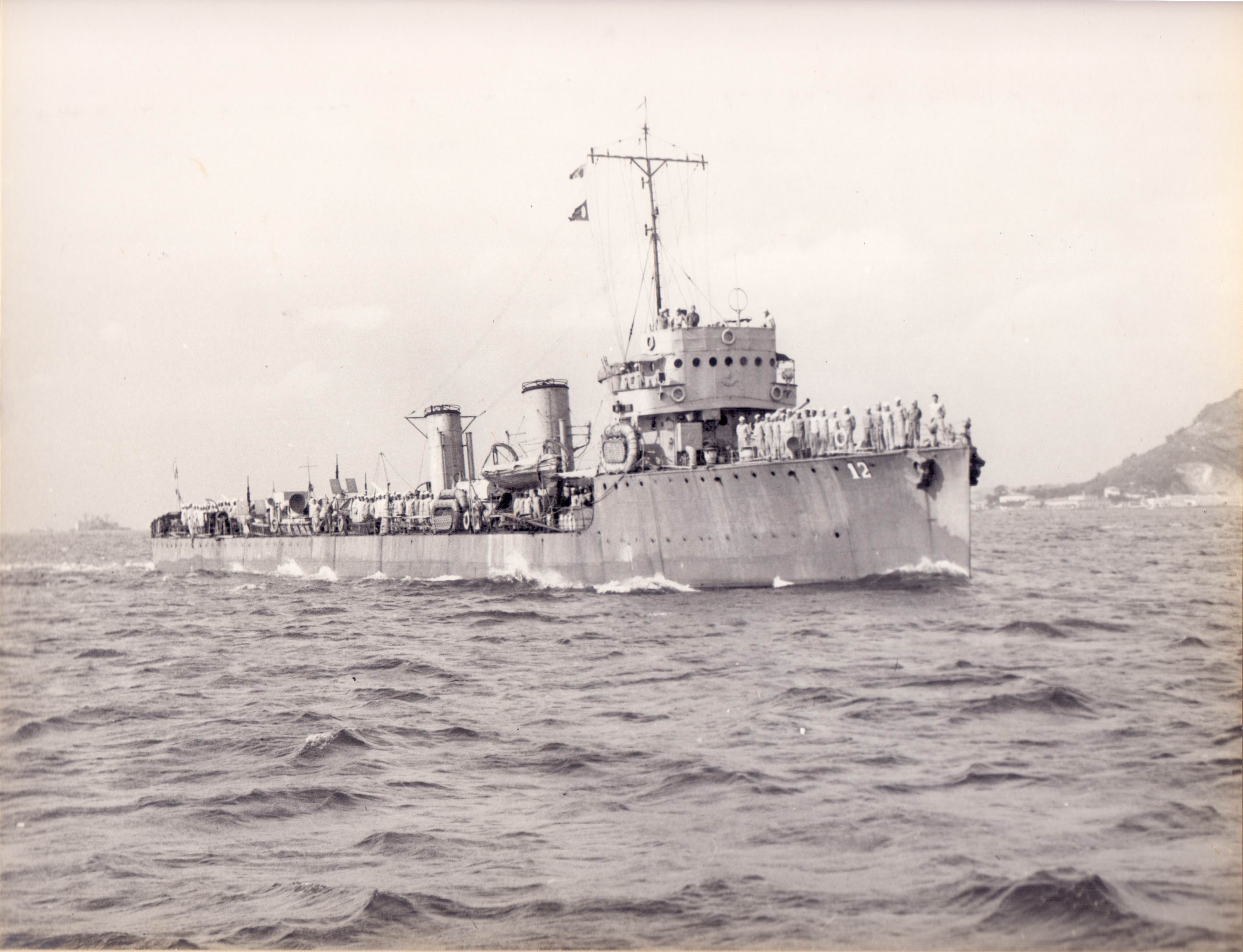 Arquivo liberado pela Marinha do Brasil através de projeto GLAM com Wiki Educação Brasil